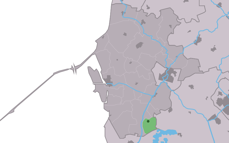 Kaartsje fan himrik fan Hieslum